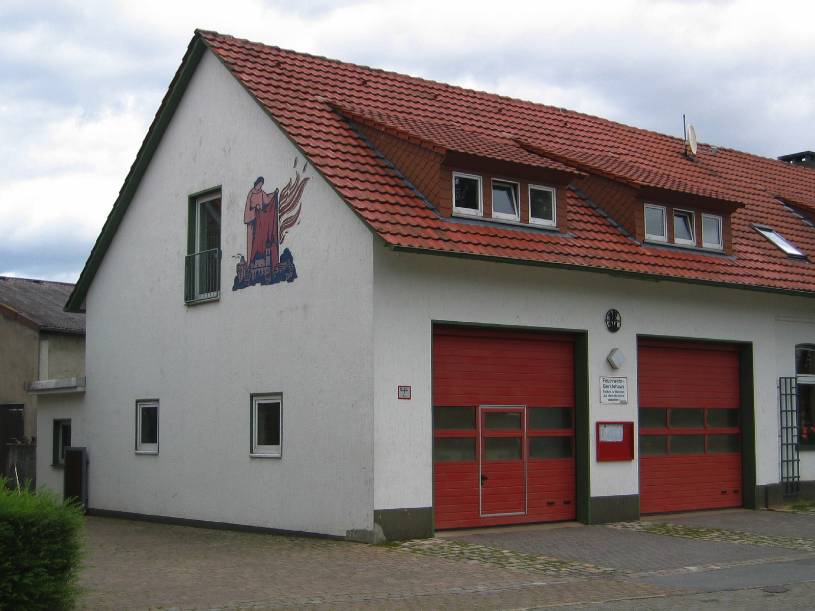 Das 1961 eingeweihte Feuerwehrgerätehaus der Freiwilligen Feuerwehr Bad Driburg Löschgruppe Herste an der Heristiestraße in Herste, Bad Driburg, Deutschland.